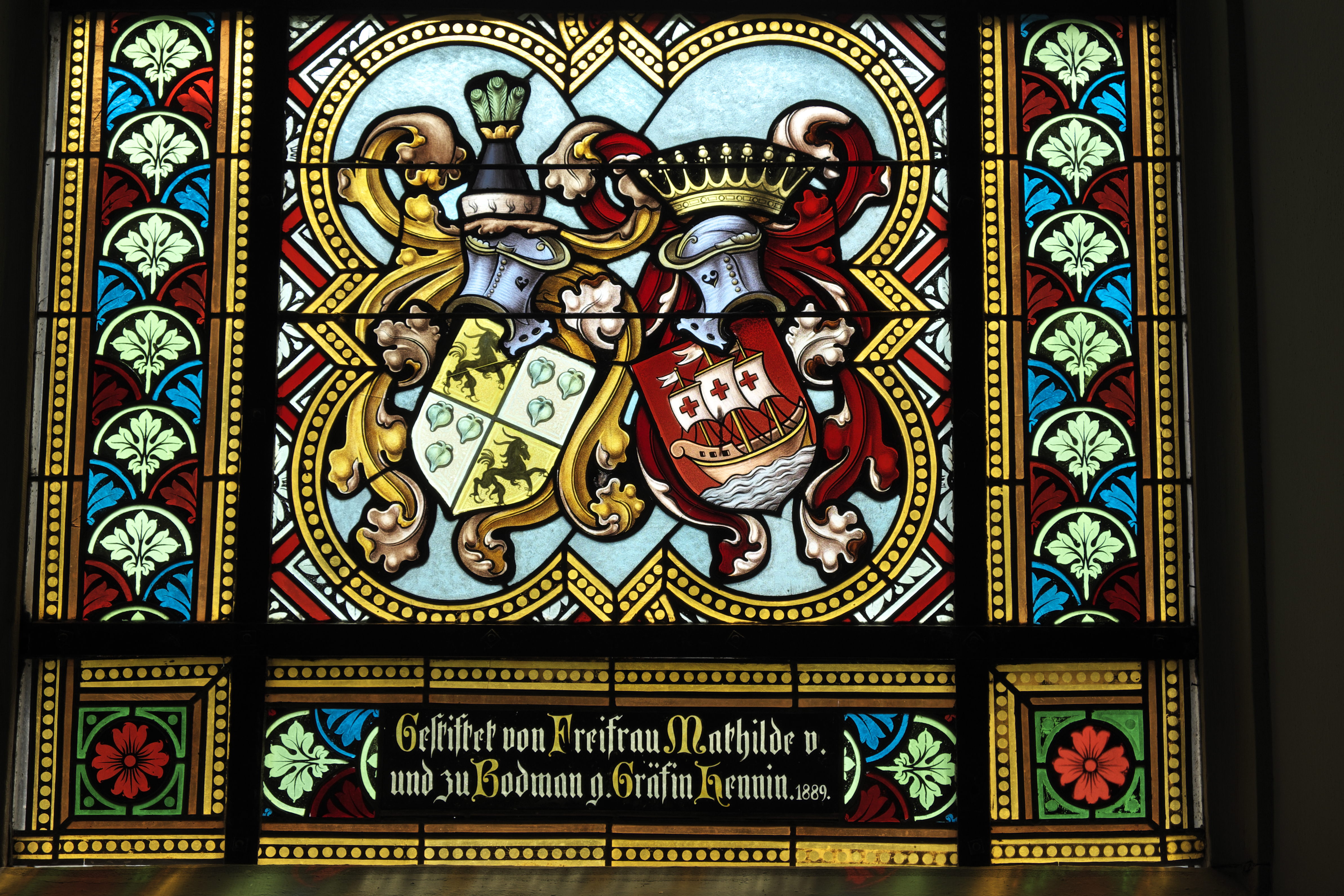 Katholische Pfarrkirche St. Peter und Paul in Bodman-Ludwigshafen im Landkreis Konstanz (Baden-Württemberg/Deutschland), Bleiglasfenster von 1889, Darstellung: Hl. Mathilde, Wappen der Stifterin Mathilde Freifrau von und zu Bodman, geb. Gräfin von Henin (Ausschnitt unten)